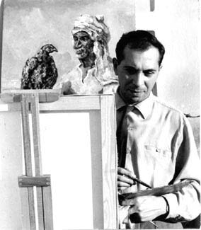 Vincenzo Romano Salvia, nei primi anni sessanta, a Tripoli.